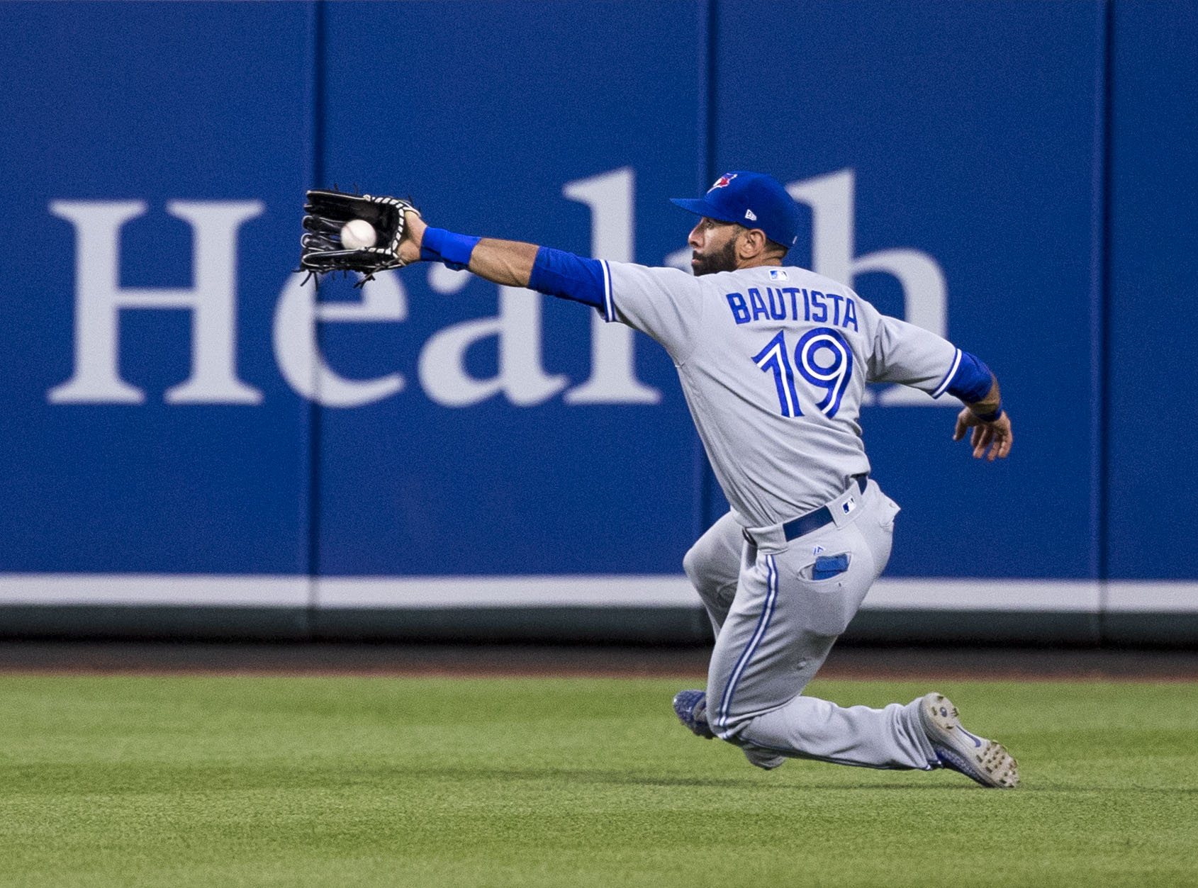 Blue Jays at Orioles